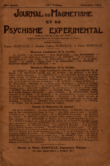 Jornal sobre o Magnetismo. Hector Durville,Heitor Durville,Bravatsk